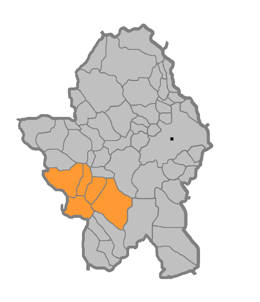 Мјесна заједница Павићи